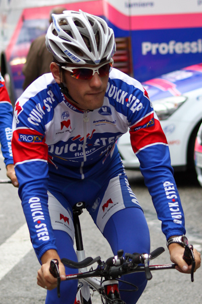 Prologue du Critérium du Dauphiné 2011, Saint Jean de Maurienne